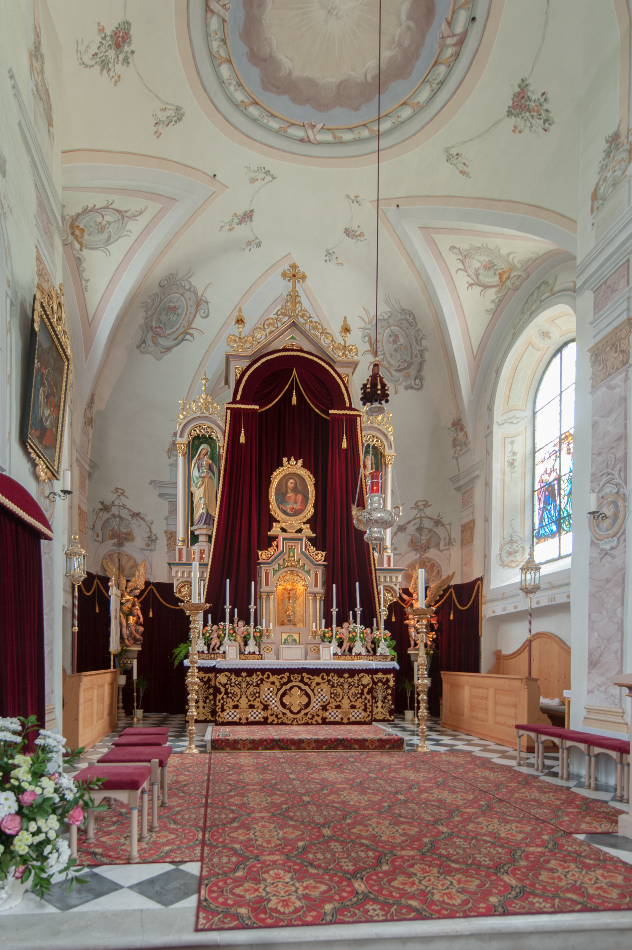 Wiki takes Nordtiroler Oberland: Kath. Pfarrkirche Mariae Sieben Schmerzen mit Friedhof